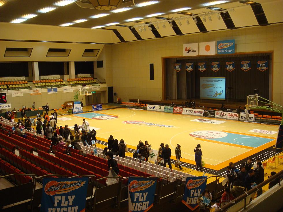 高松市香川総合体育館第1競技場（日本プロバスケットボールリーグ開催時）